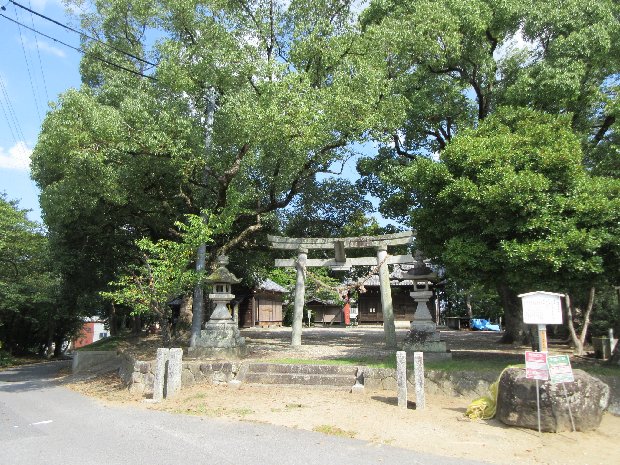 井ノ口稲荷神社（岡崎市井ノ口町）